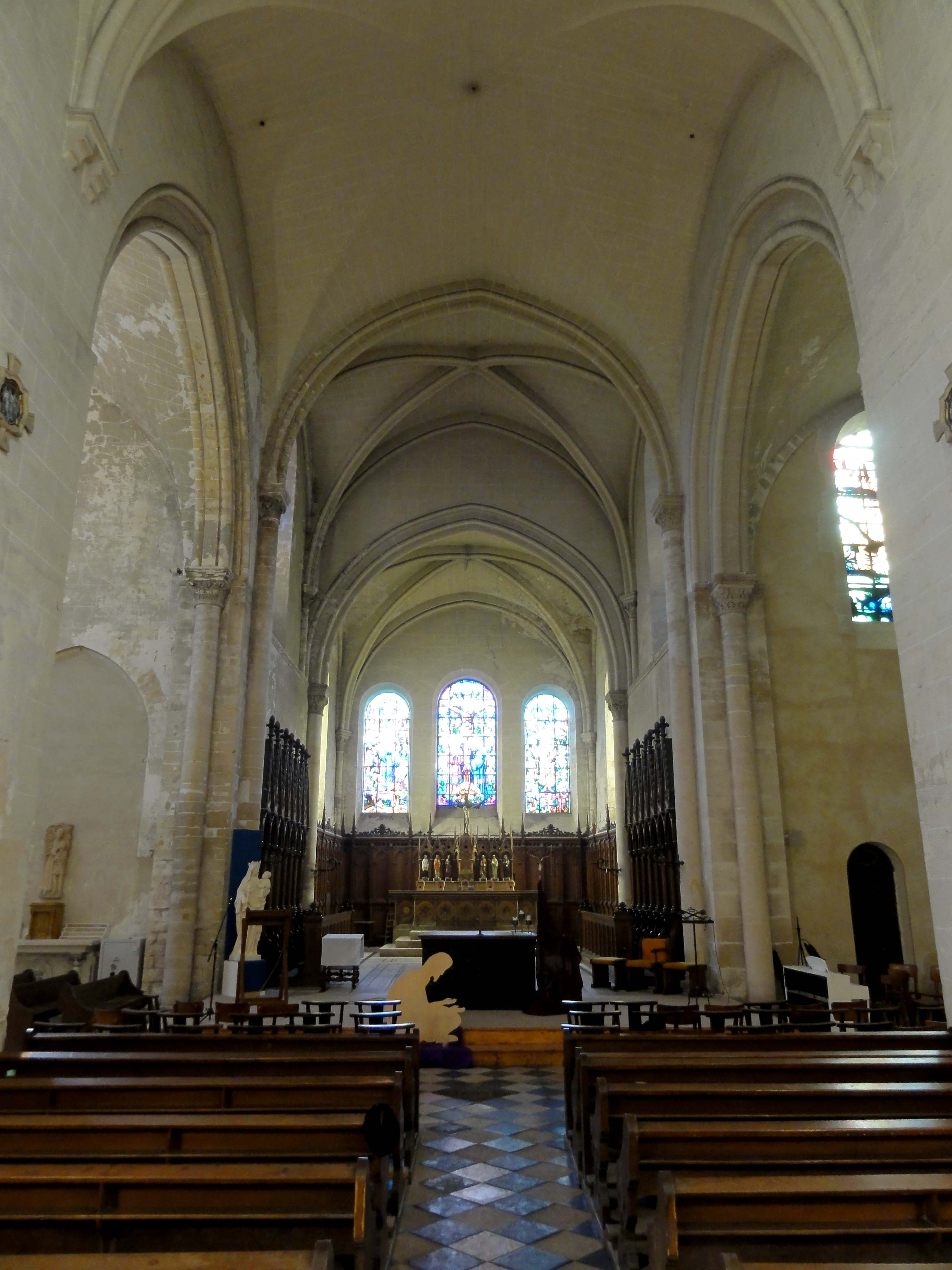 Voir titre.